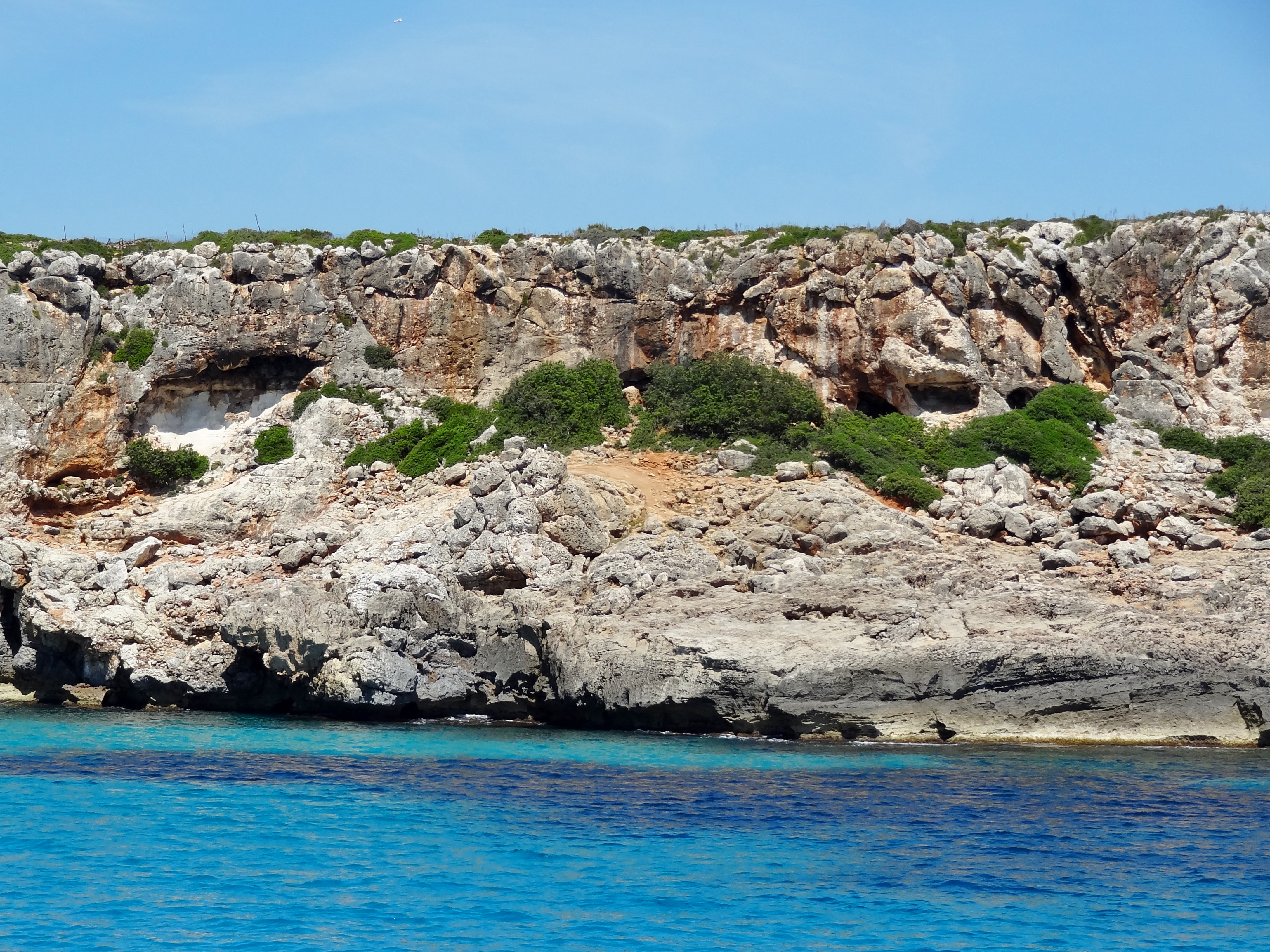 Eingang zur Cova des Moro an der Ostküste von Mallorca, Spanien